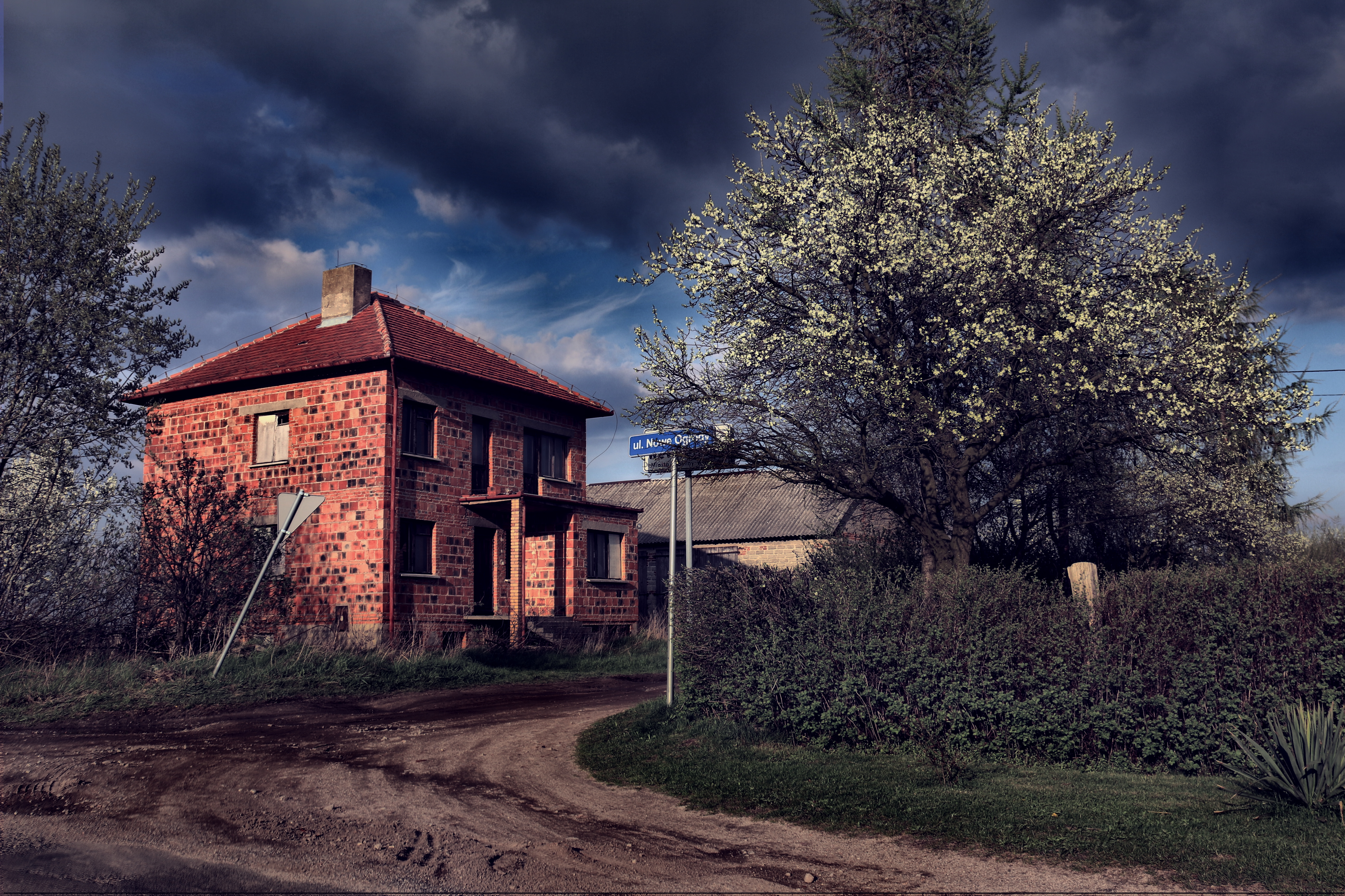 Wschowa, ul. Nowe Ogrody